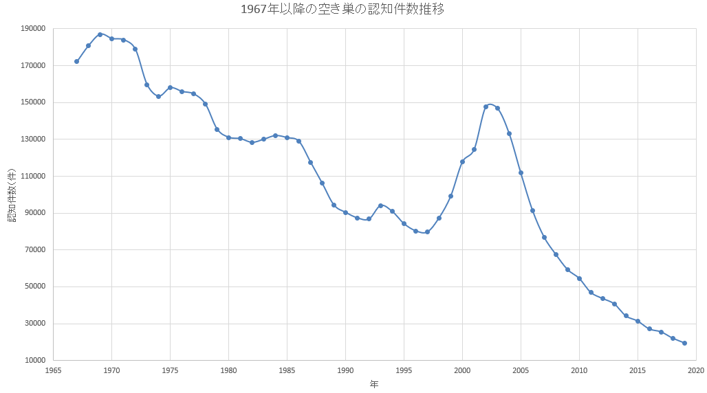 1967年以降の空き巣認知件数推移